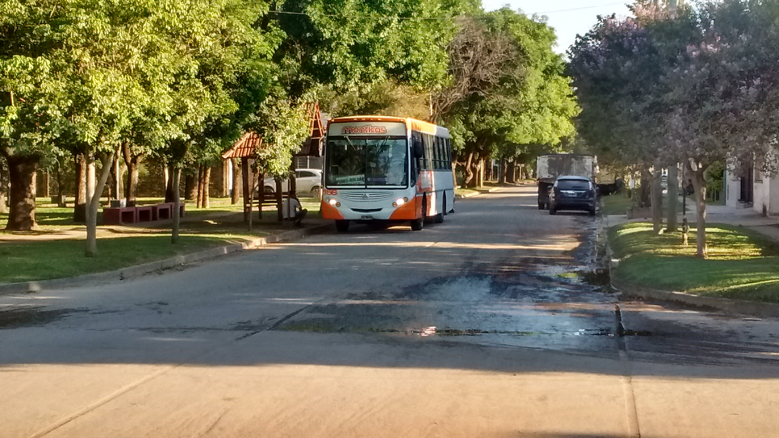 Vista del Colectivo (autobús) de la empresa Monticas, haciendo el recorrido Roldán - Funes - Rosario.